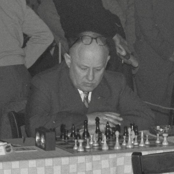 Paul Heuäcker bei der Hessenmeisterschaft 1960, fotografiert von Gerhard Hund